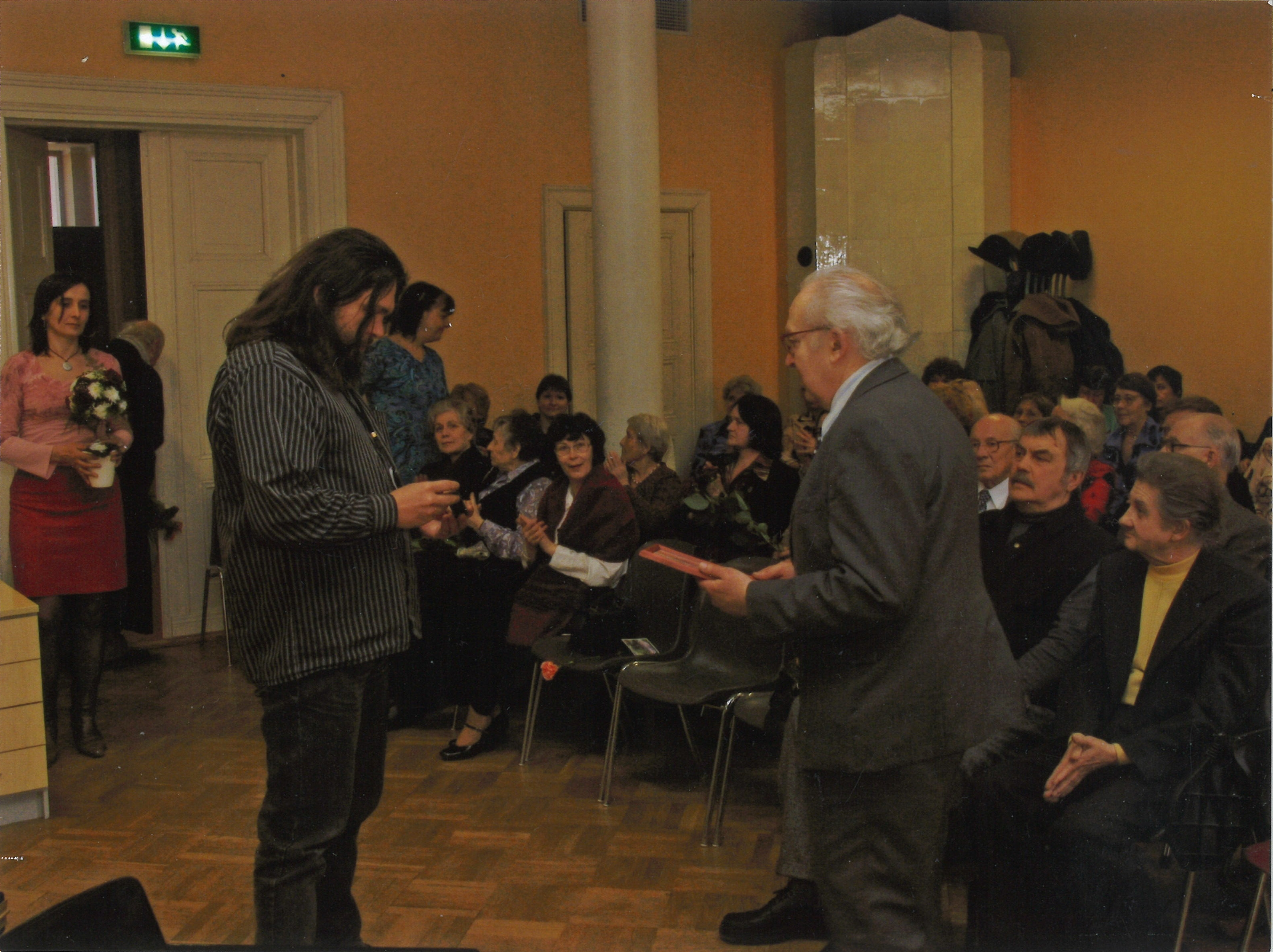 Kalju Lillepuu 70. aasta juubel Viljandi Kultuuriakadeemias 29. märtsil 2005 a. Õnnitleb akadeemia rektor Anzori Barkalaja.